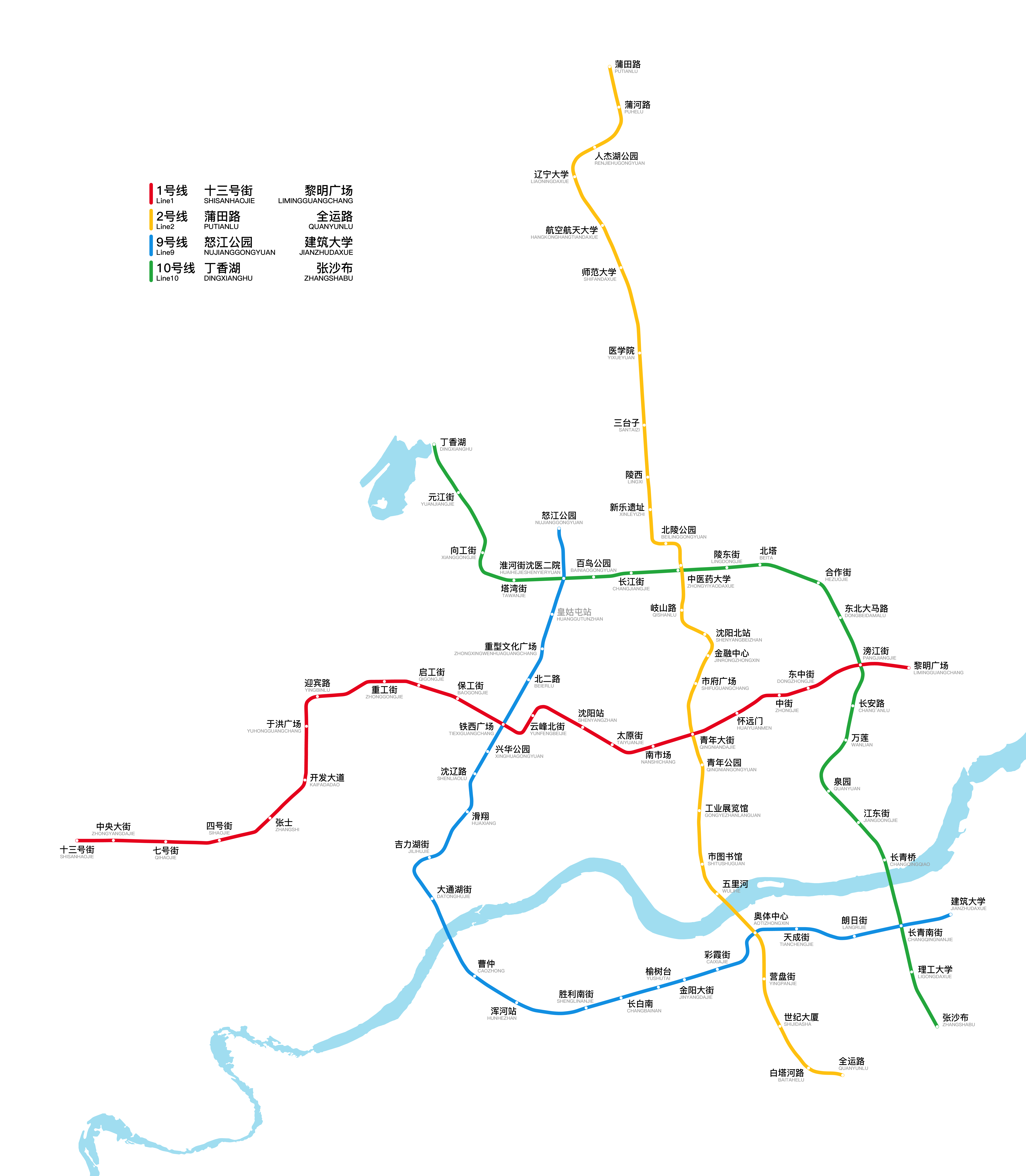 中文（中国大陆）: 沈阳地铁线路图，更新于2018年6月